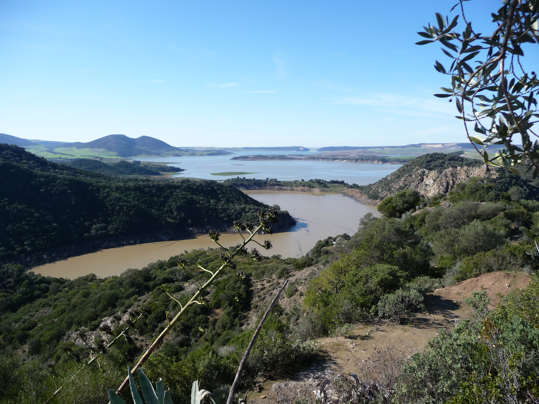 TajoDelAguila-P1060325.JPG